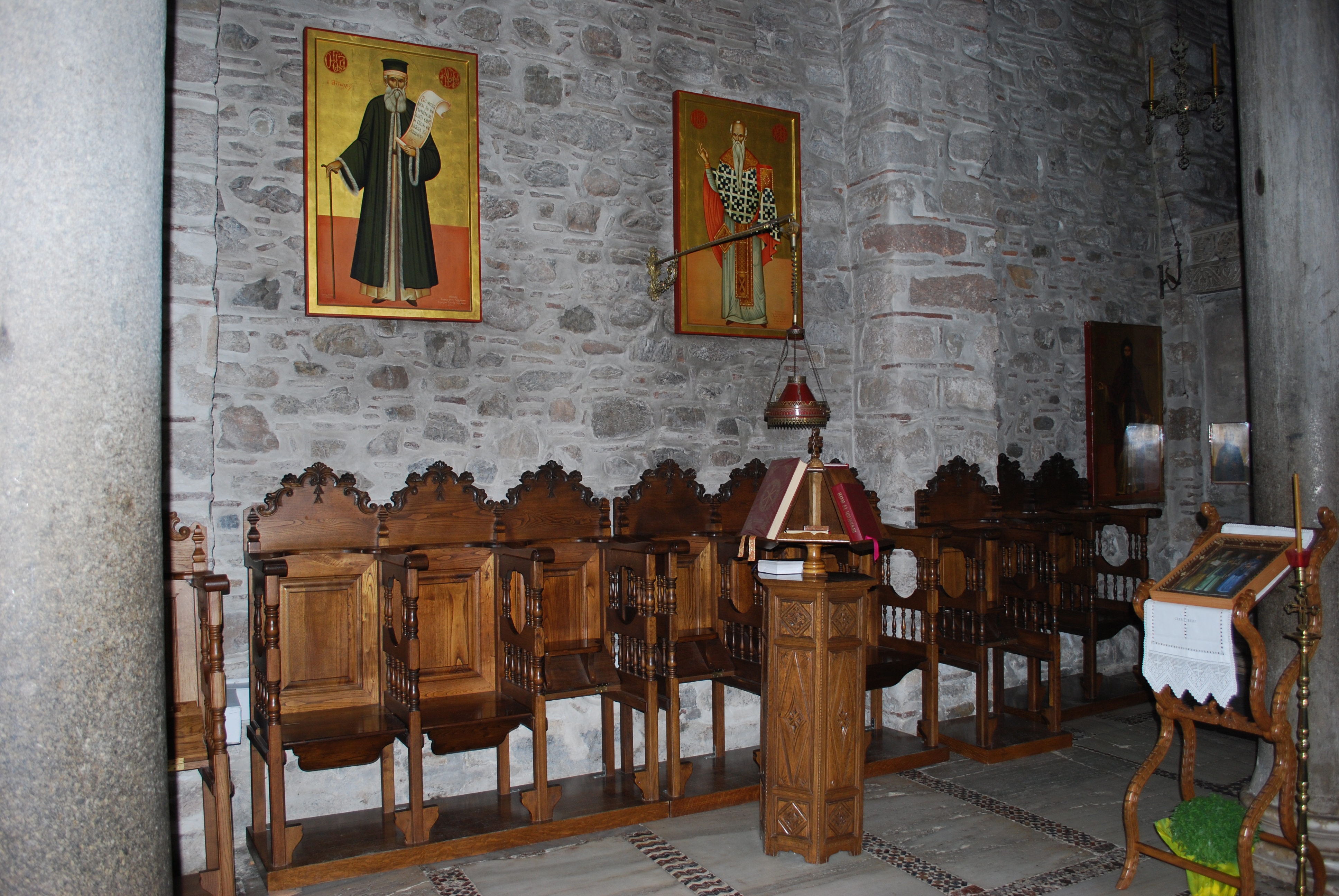 Vue du monastère de Hosios Loukas, en Béotie.